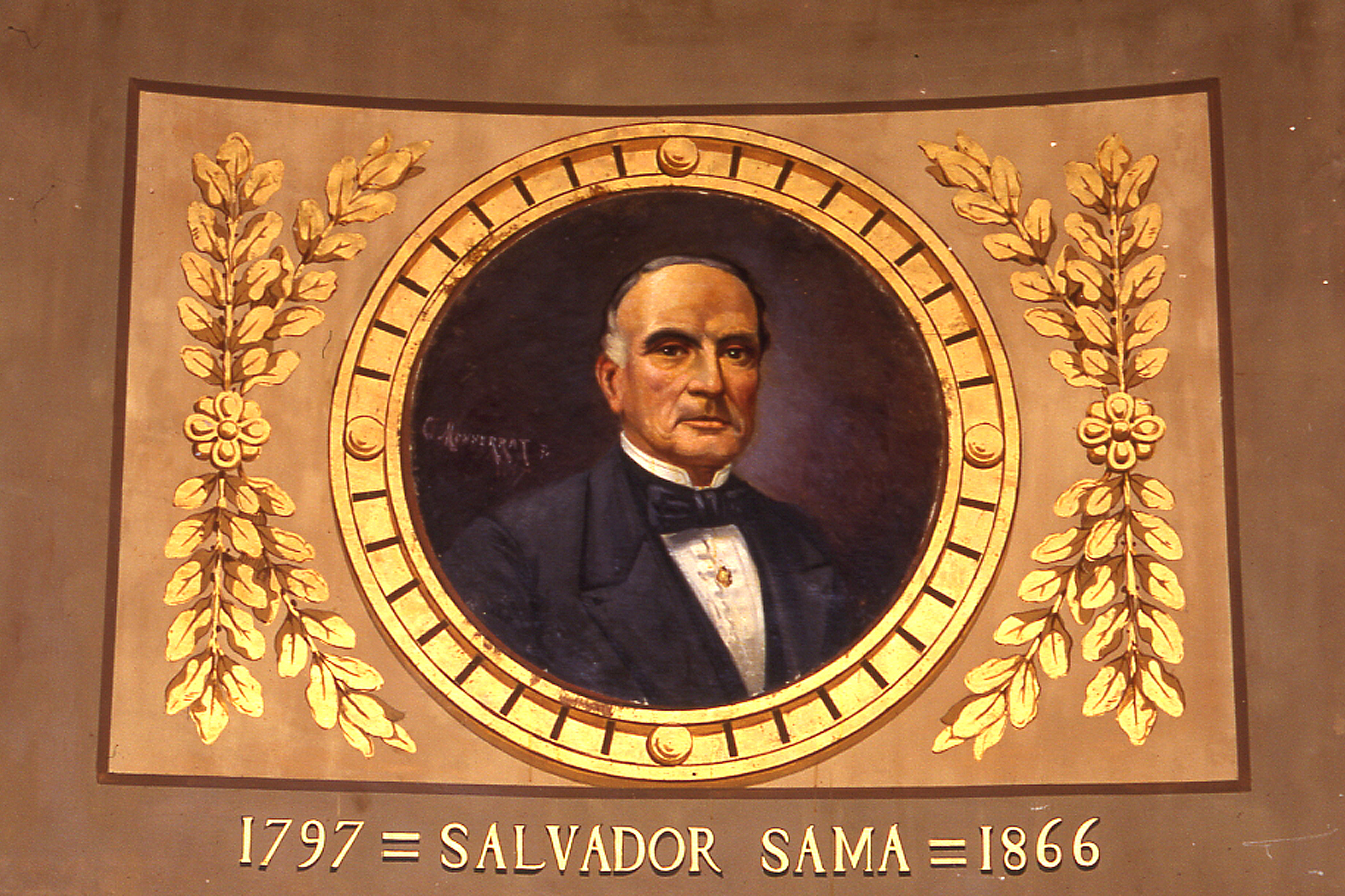 Retrat de Salvador Samà. pintura sobre tela. Biblioteca Museu Víctor Balaguer